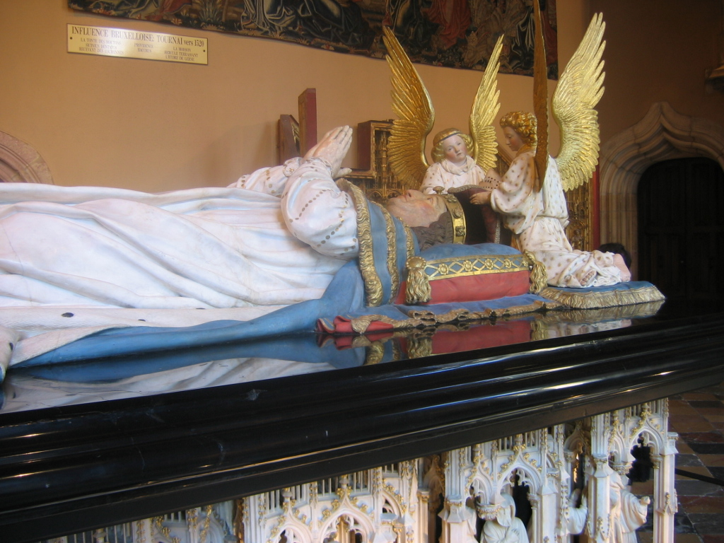 Dijon : musée des Beaux-Arts : tombeau de Philippe Le Hardi (salle des gardes)